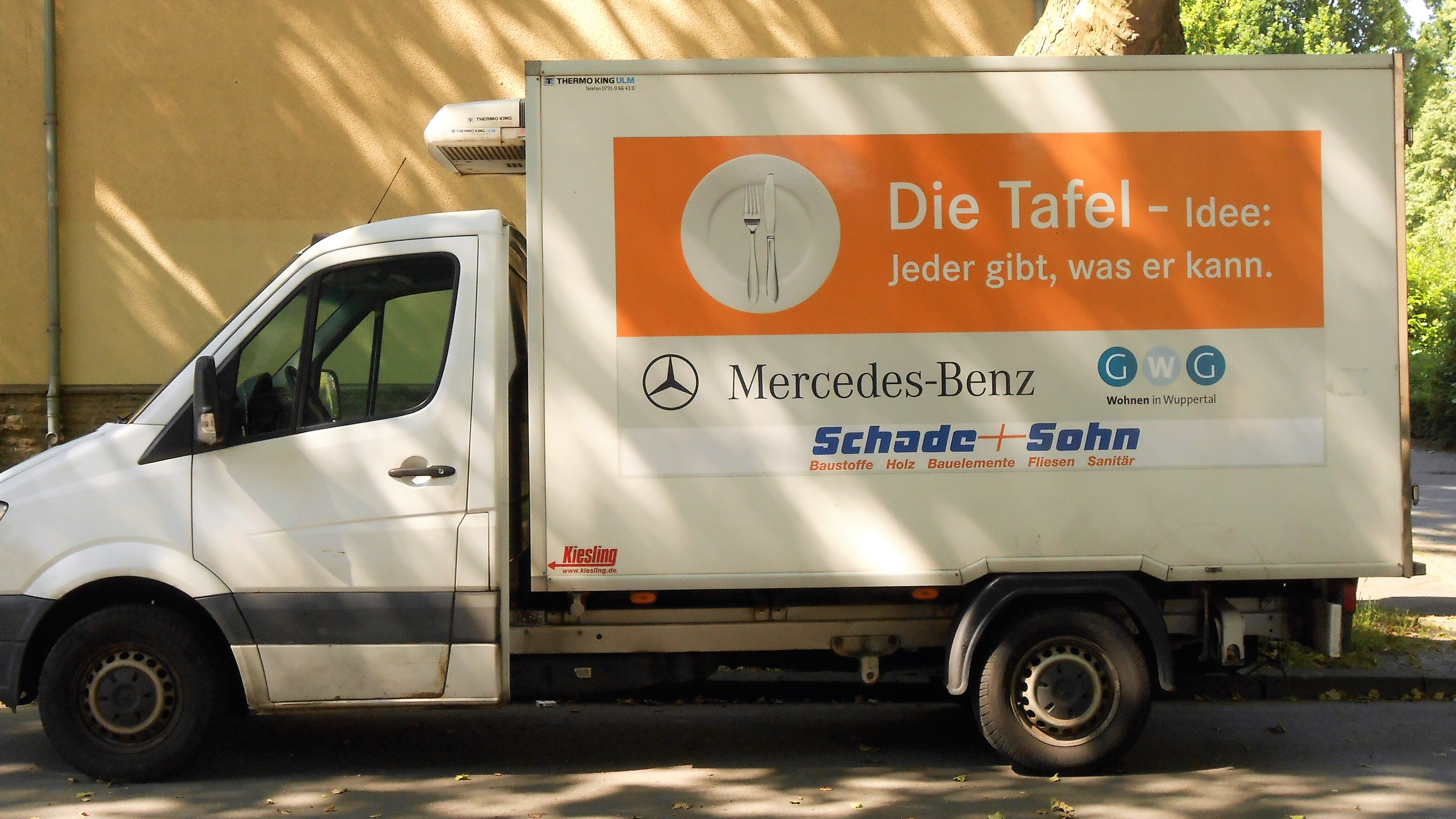 Lieferwagen der Dortmunder Tafel, gesehen in der Lessingstraße (vor der Kirche St. Aposteln) am Sonntag Nachmittag, den 5. Juni 2016.